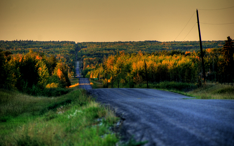 Alberta, Canada